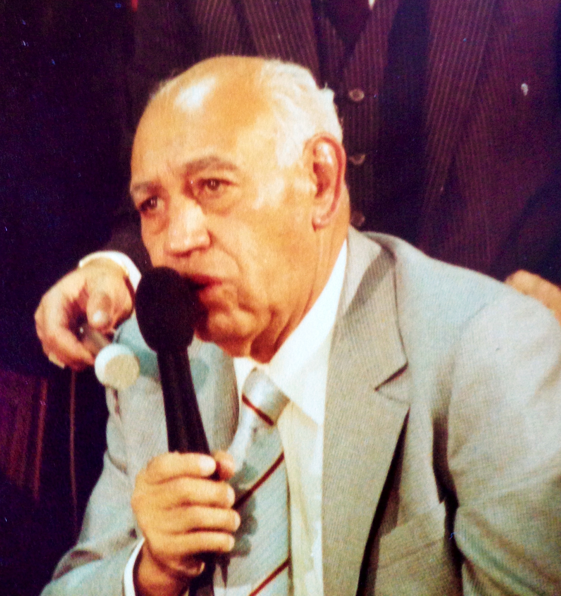 Lauro Ortega Martínez